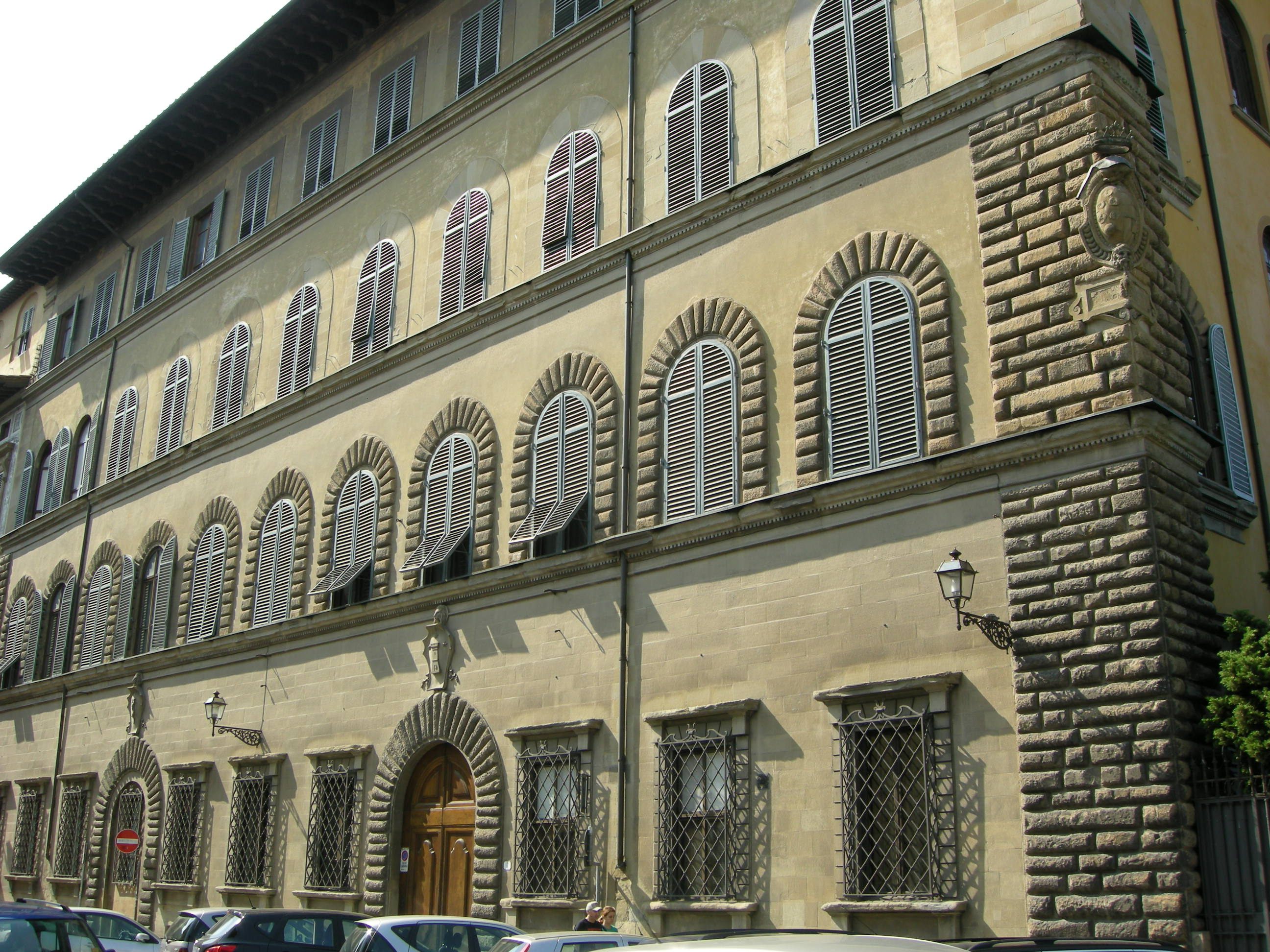 Palazzo Torrigiani Del Nero, firenze